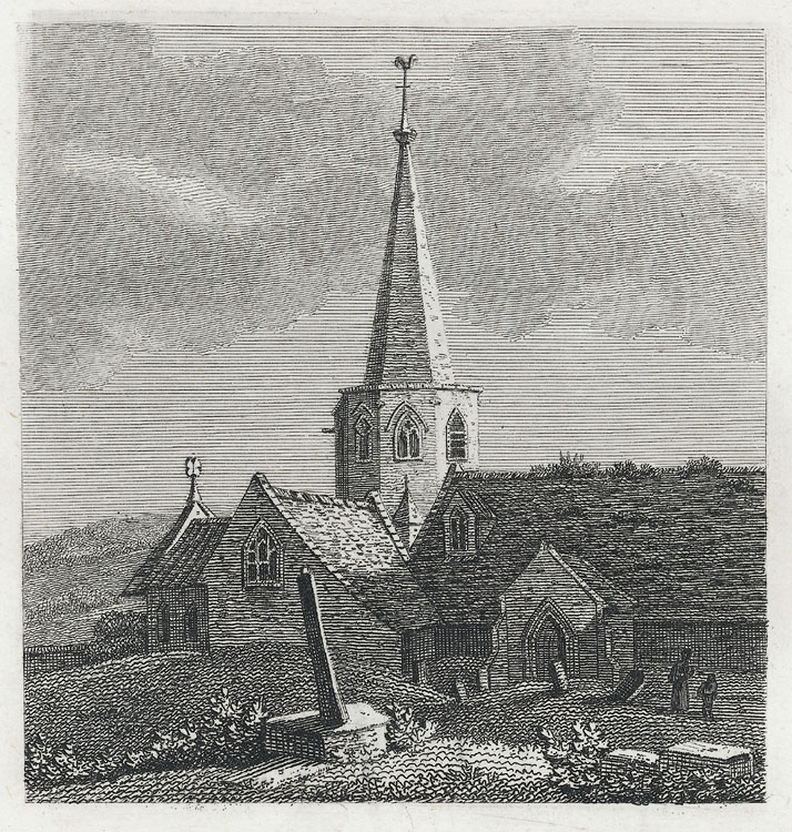 Churchyard.